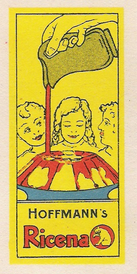 Produktwerbung "Ricena" (gelb)